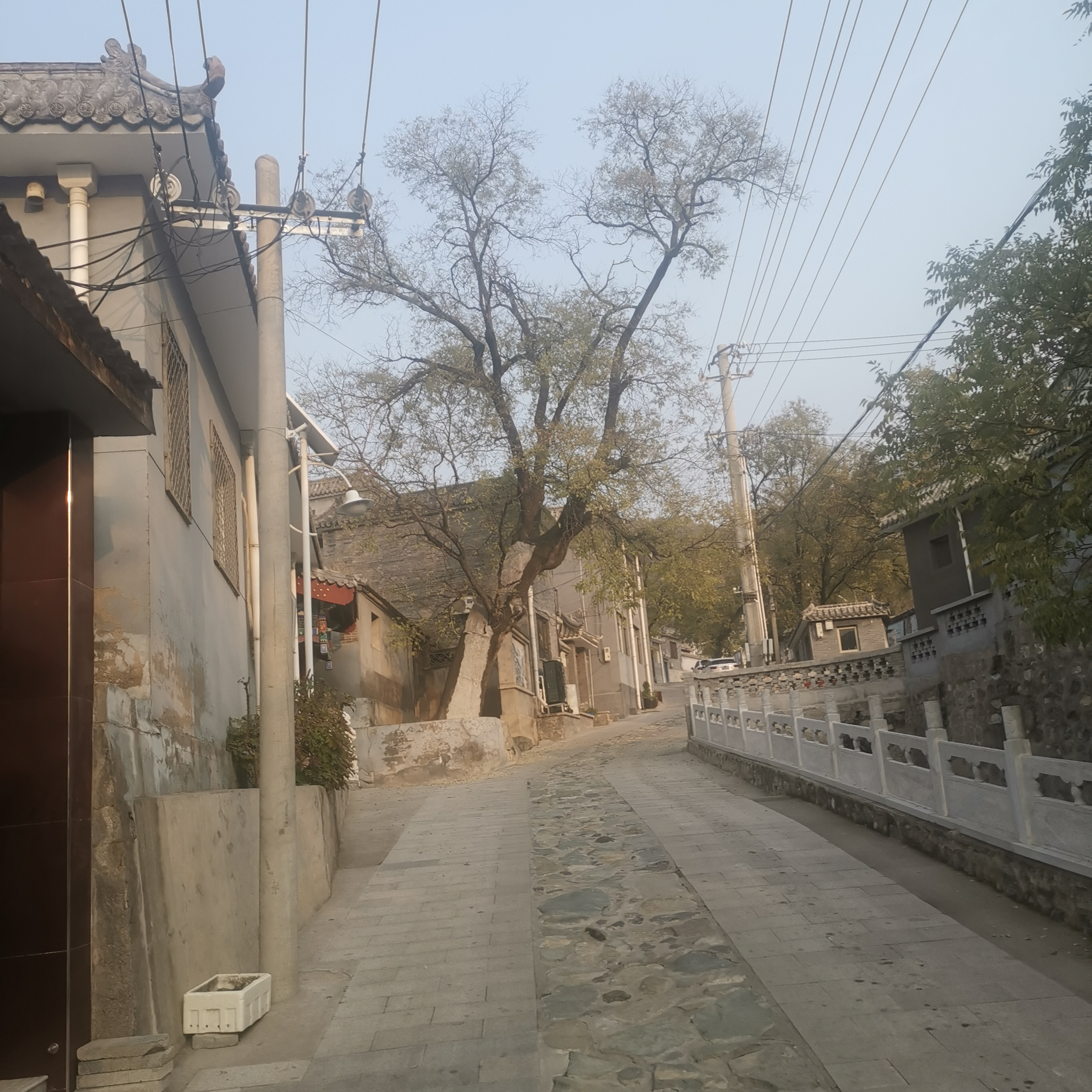 中文（中国大陆）: 桥耳涧村